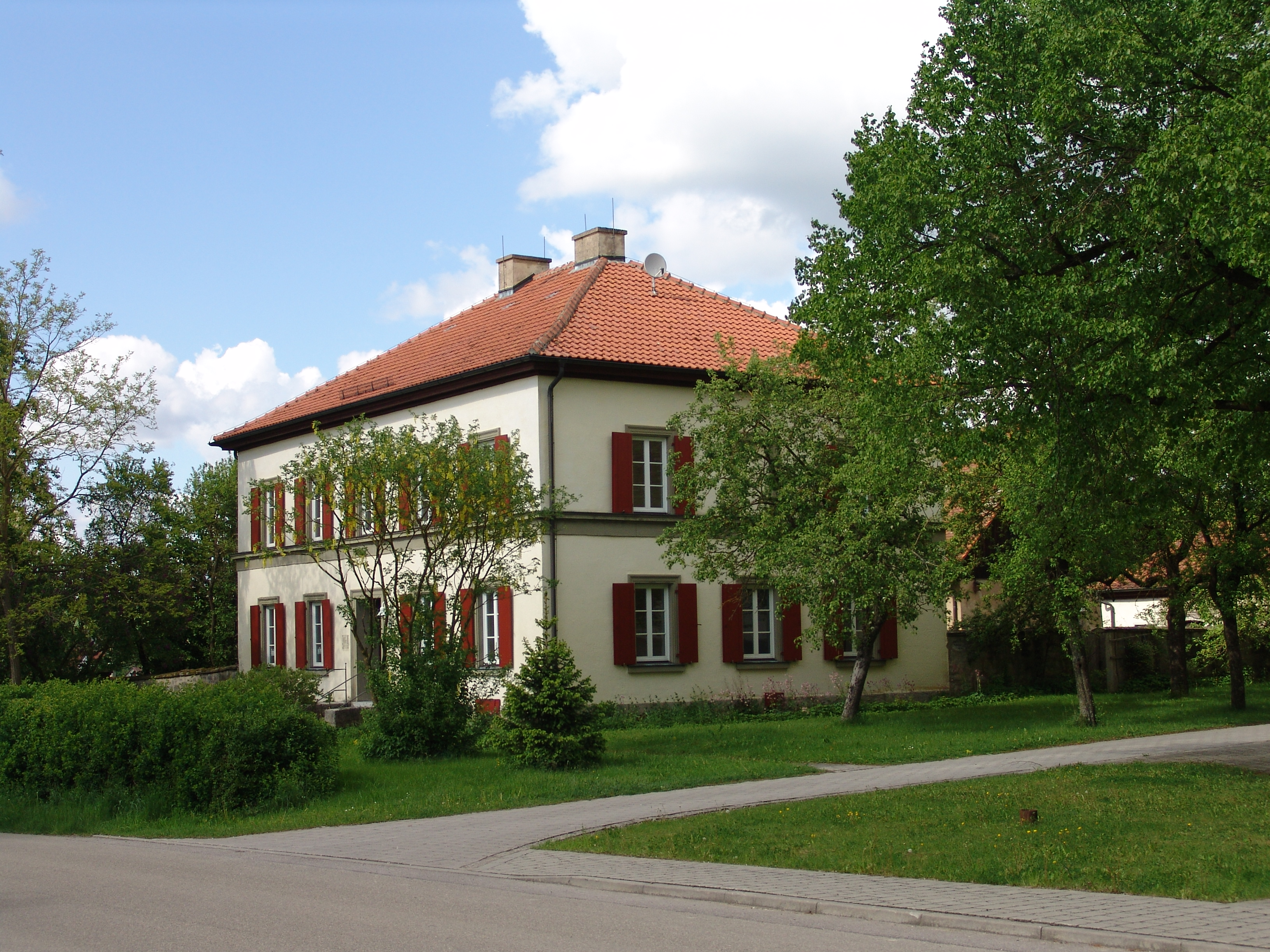 Oberoestheim Kirchplatz 8, evang-luth. Pfarrhaus